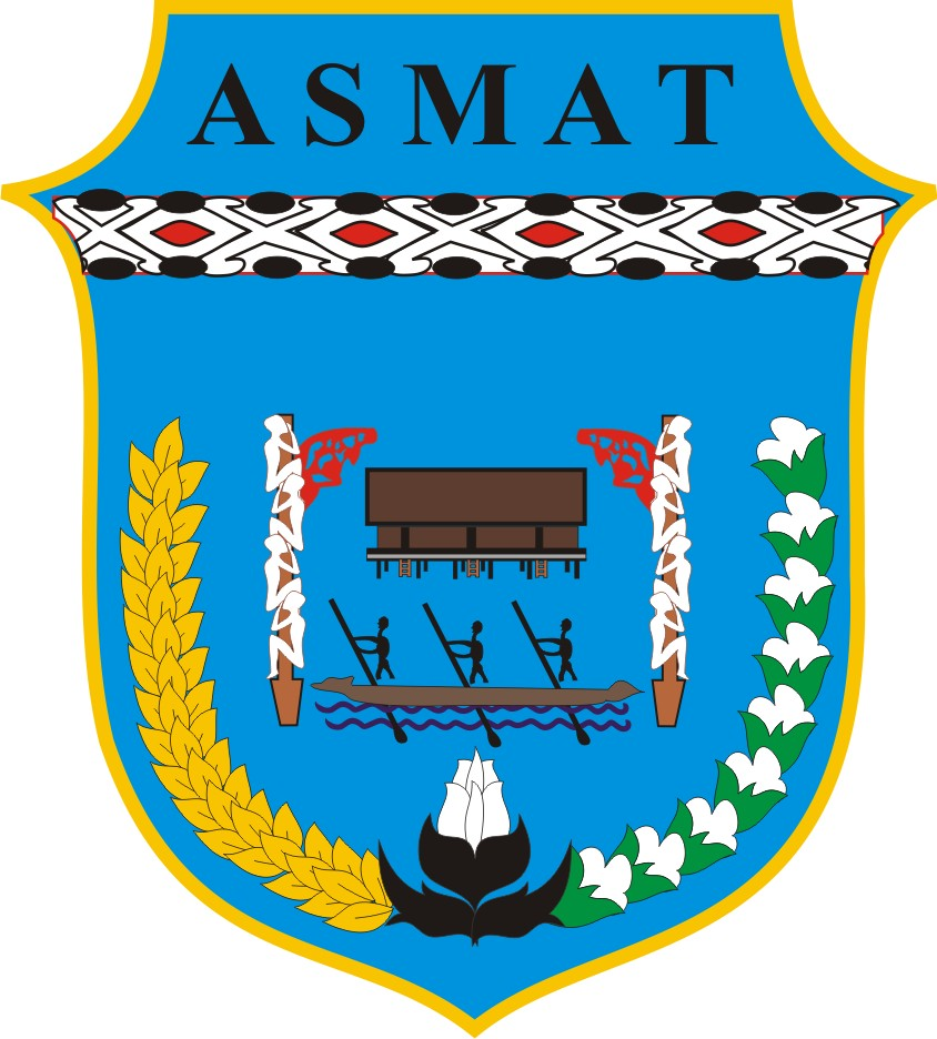 Coat of Arms (Lambang) of Regency (Kabupaten) Asmat, Provinsi Papua, Indonesia